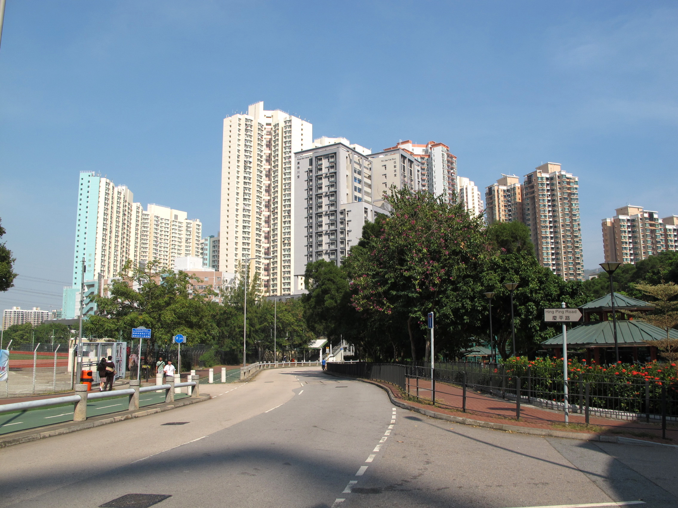 Tuen Mun Fu Tei